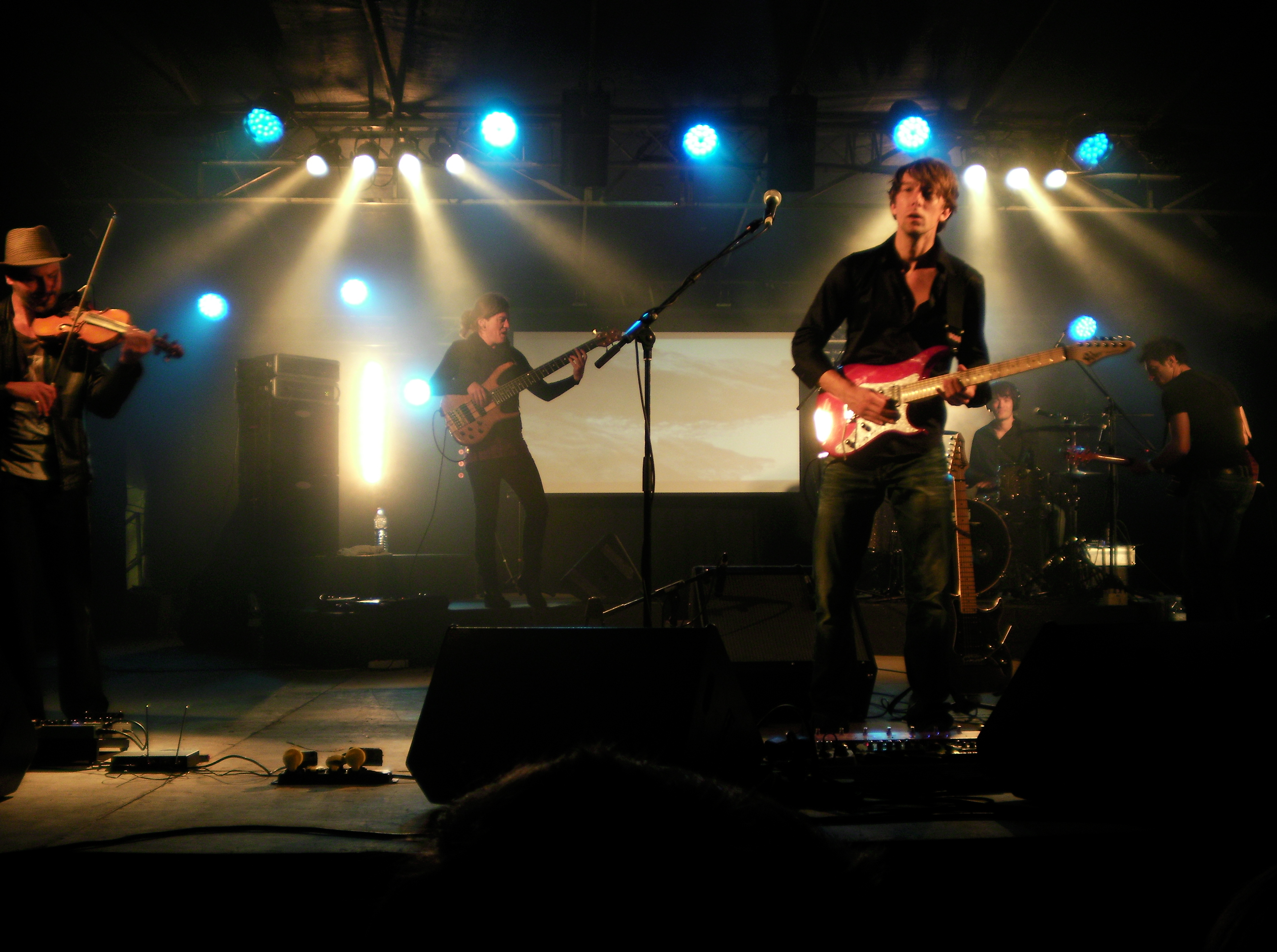 Le guitariste Julien Jaffrès en concert lors du festival Gouel an eost 2012